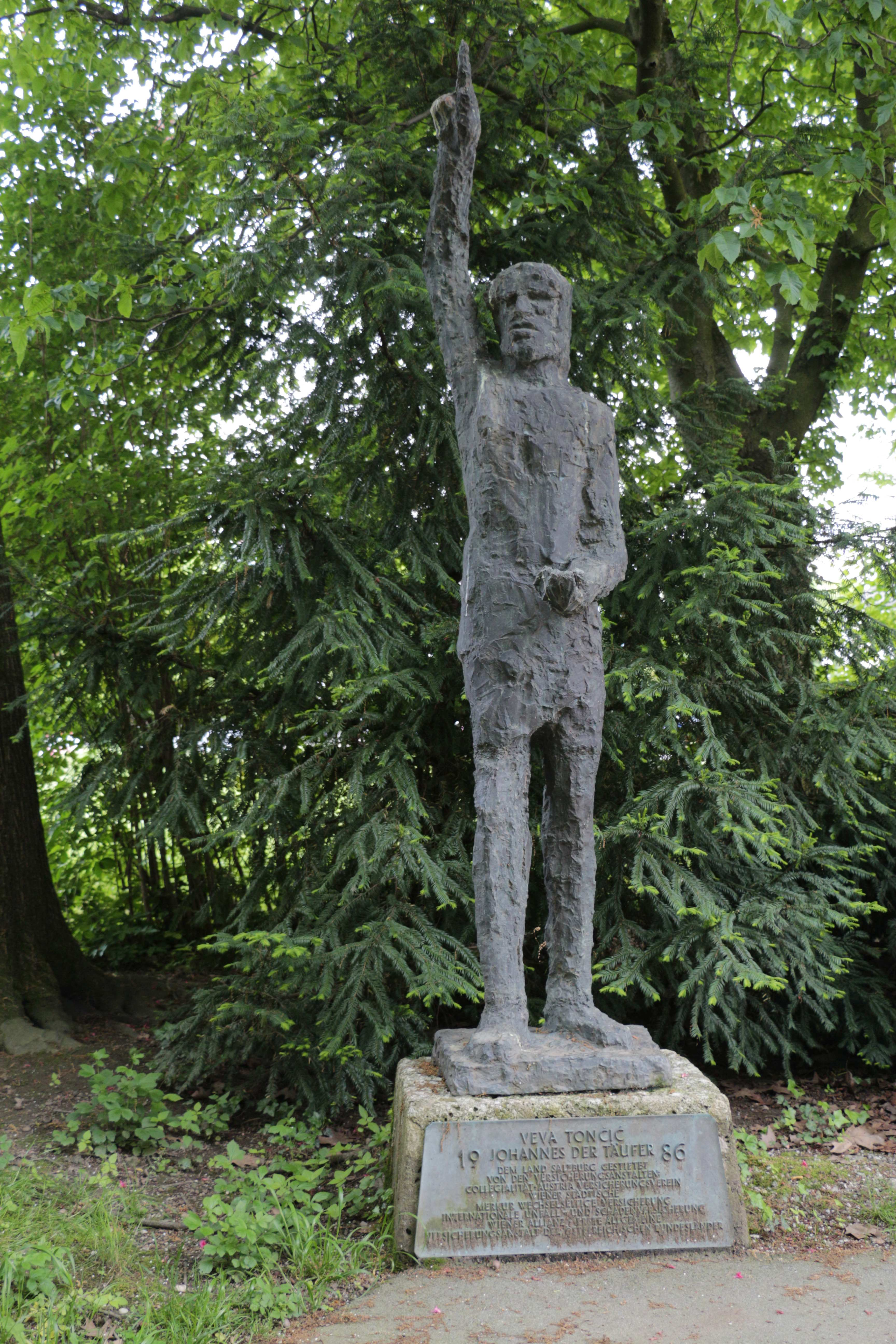 Statue "Johannes der Täufer" von Veva Tončić auf dem Gelände des Salzburger Landeskrankenhauses